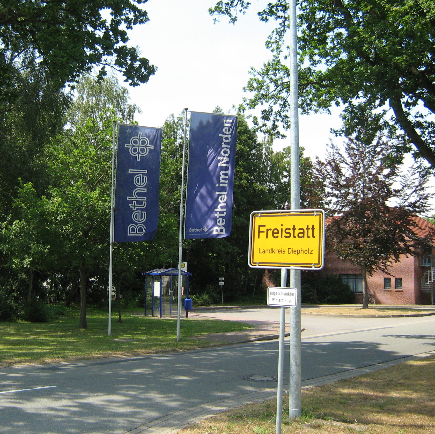 Der Ort Freistatt bei Diepholz im Jahr 2008